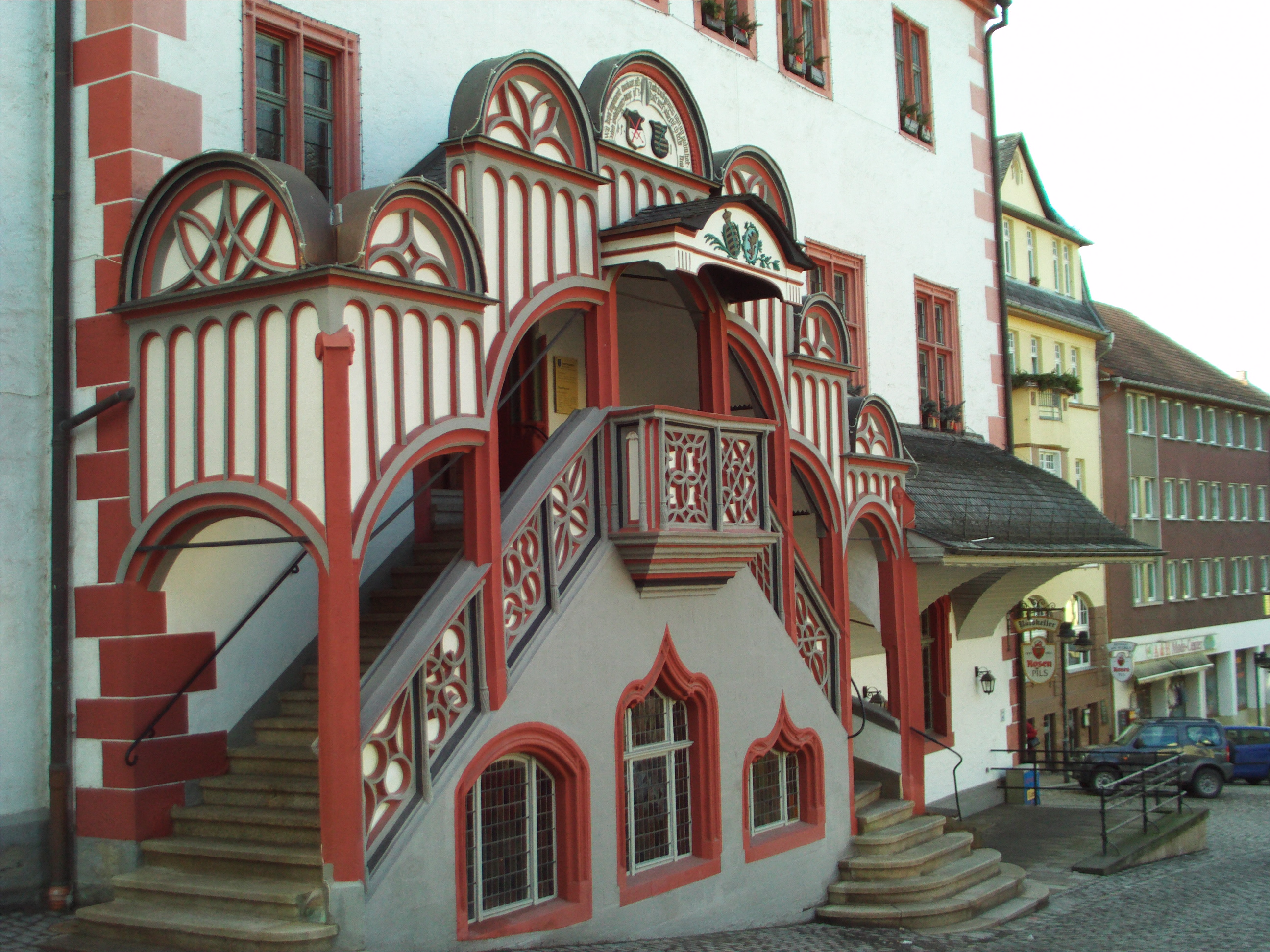 Freitreppe des Rathauses der Stadt Pößneck